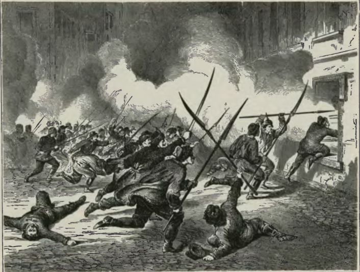 Zdobycie koszar w Rawie 4.02.1863